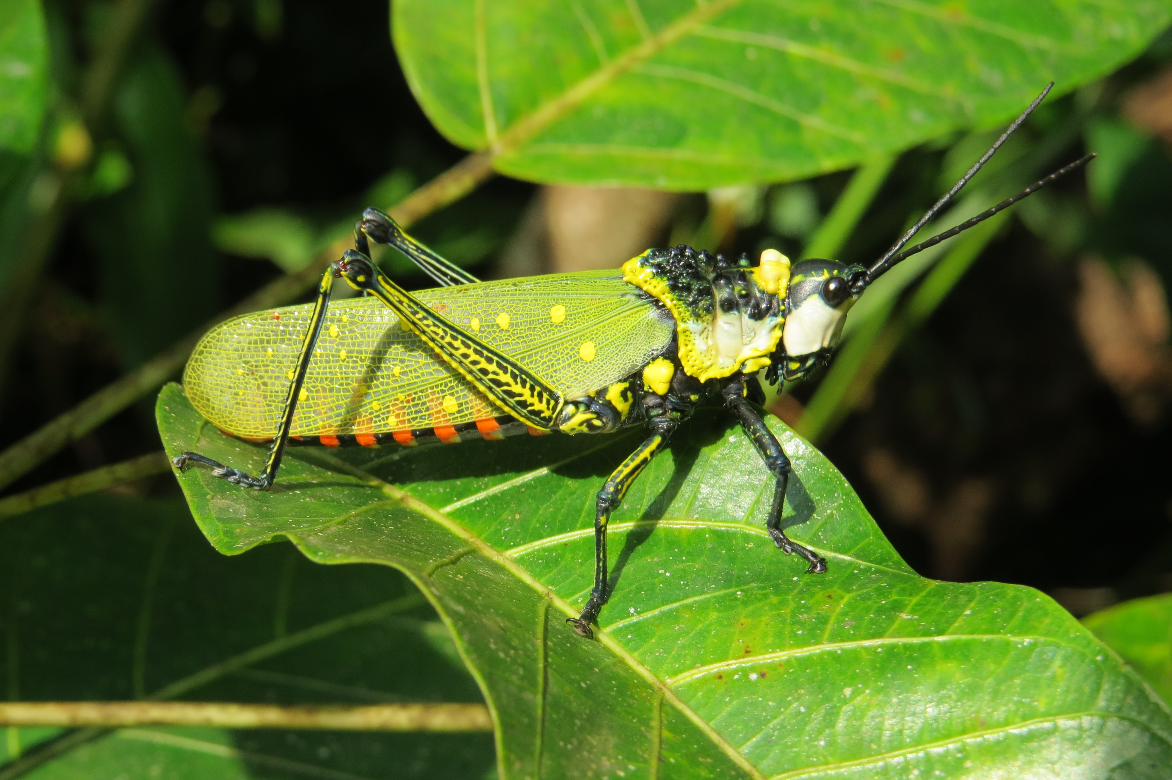 Photos by Vinayaraj